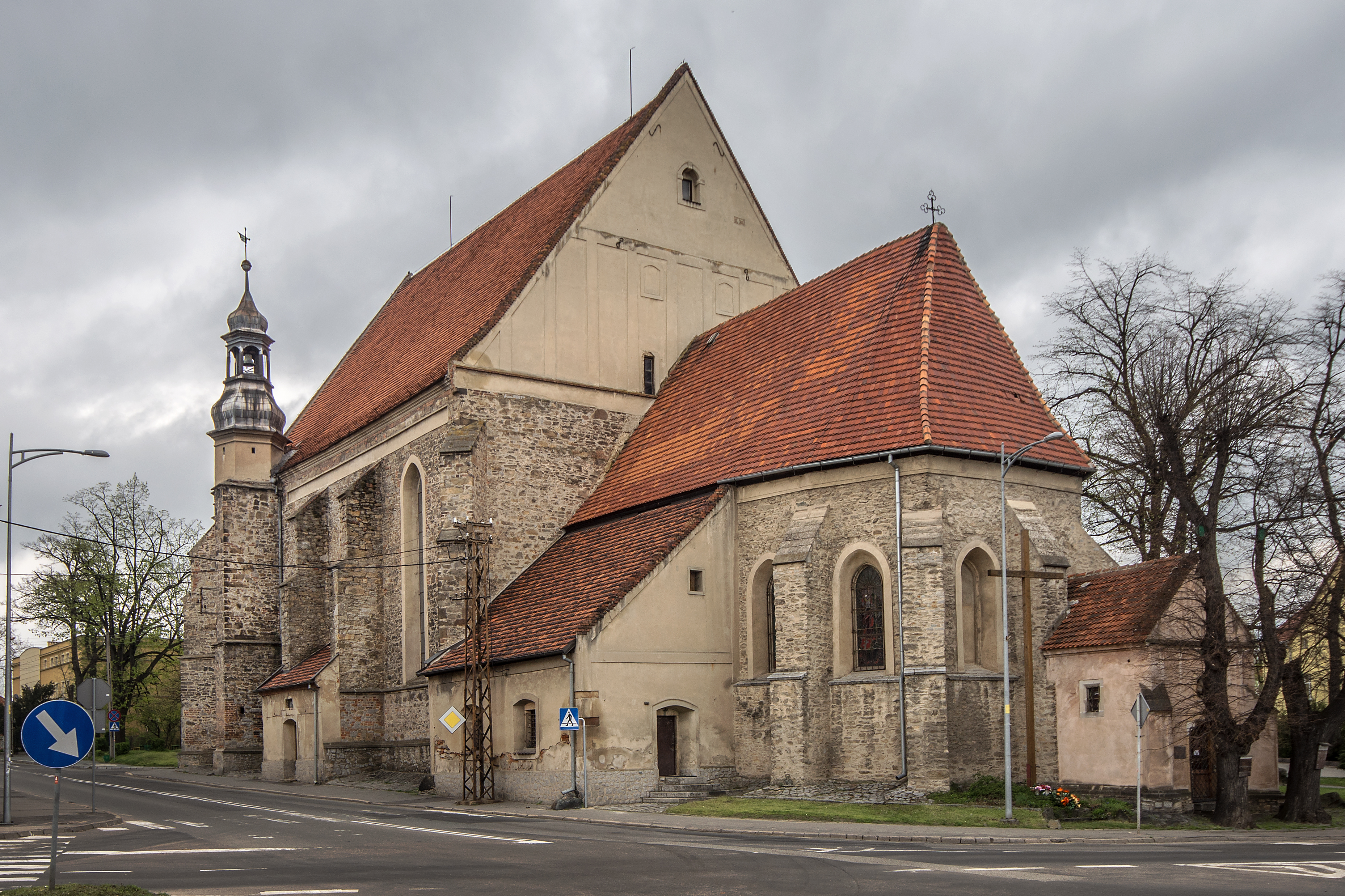 Sobótka, kościół fil. p.w. św. Anny, XIV, 1500, 1725